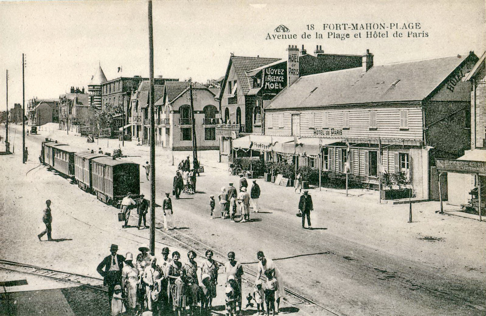 Carte postale éditée par CAP n°18 : FORT-MAHON-PLAGE : Avenue de la Plage et Hôtel de Paris.Vue en gros plan du tramway Monchaux - Fort-Mahon-Plage exploité par la Société immobilière de St Quentin-Plagecolor